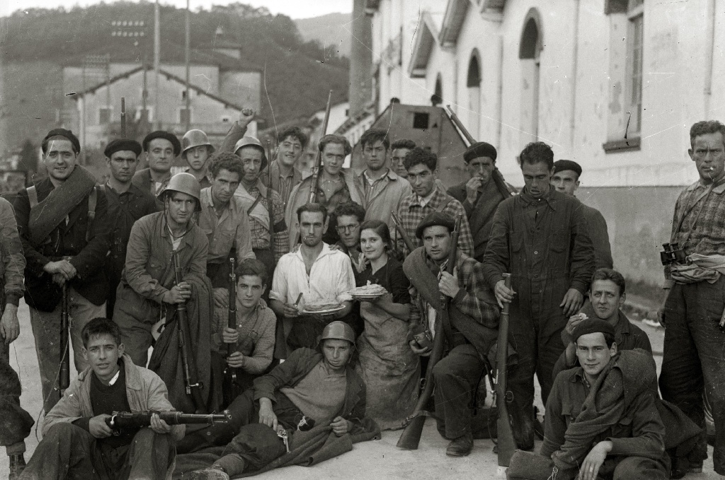 Título original: Grupos de milicianos con sus armas en la localidad de Alegia (7/10) Localización: Alegría de Oria (Guipúzcoa)